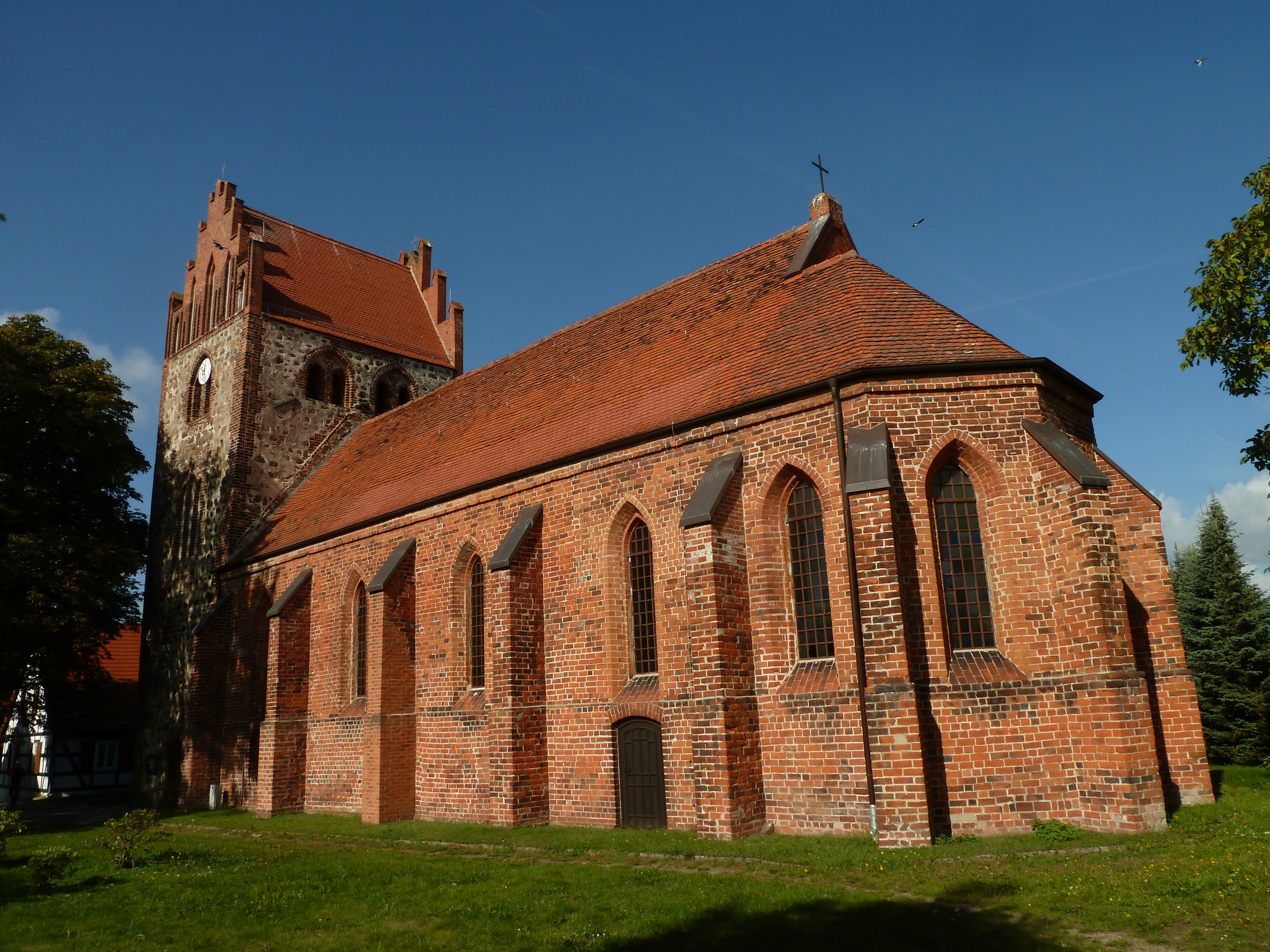 Kirche In Nitzow, heute Stadtteil von Havelberg